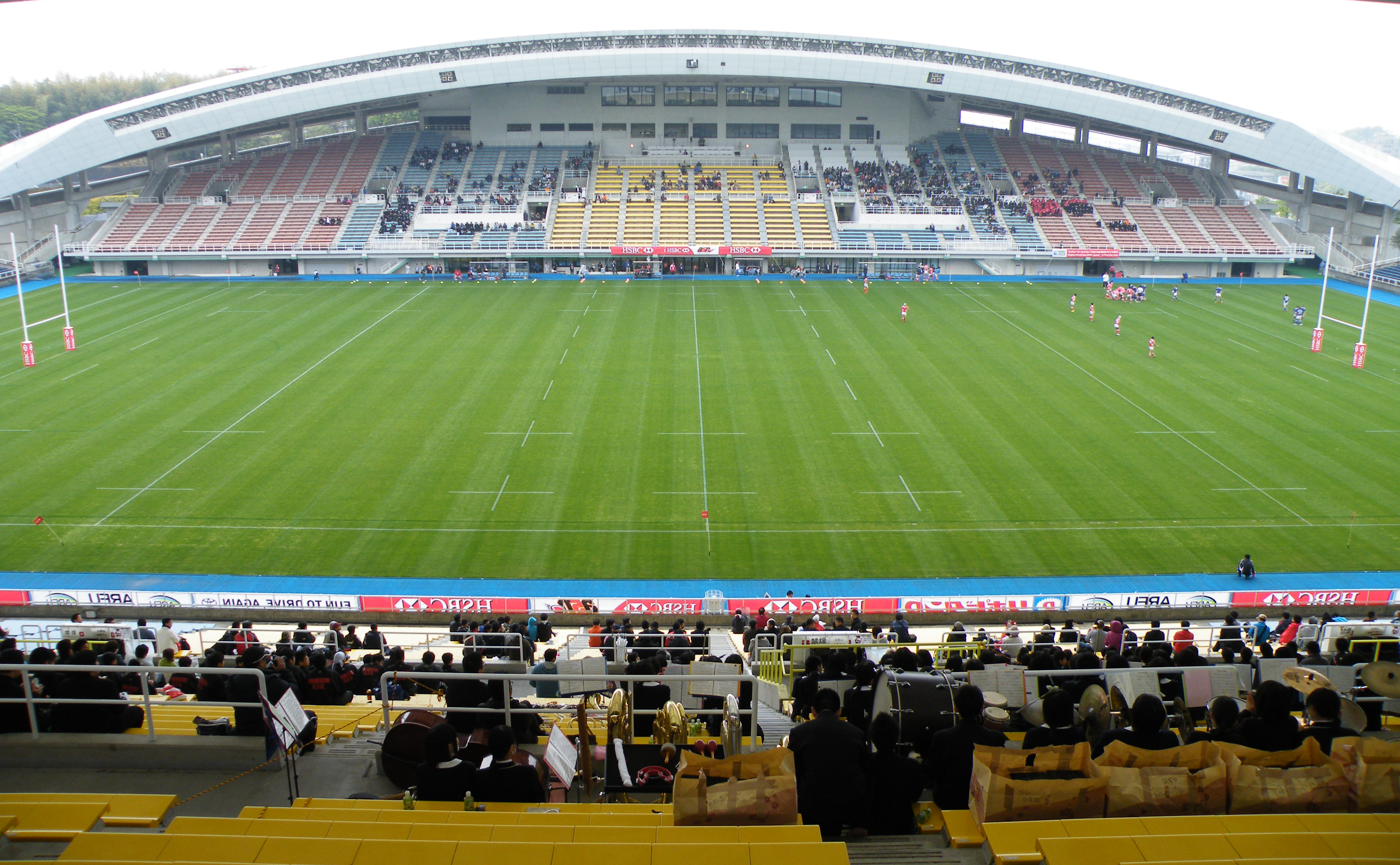 自身がレベスタにて撮影したもの